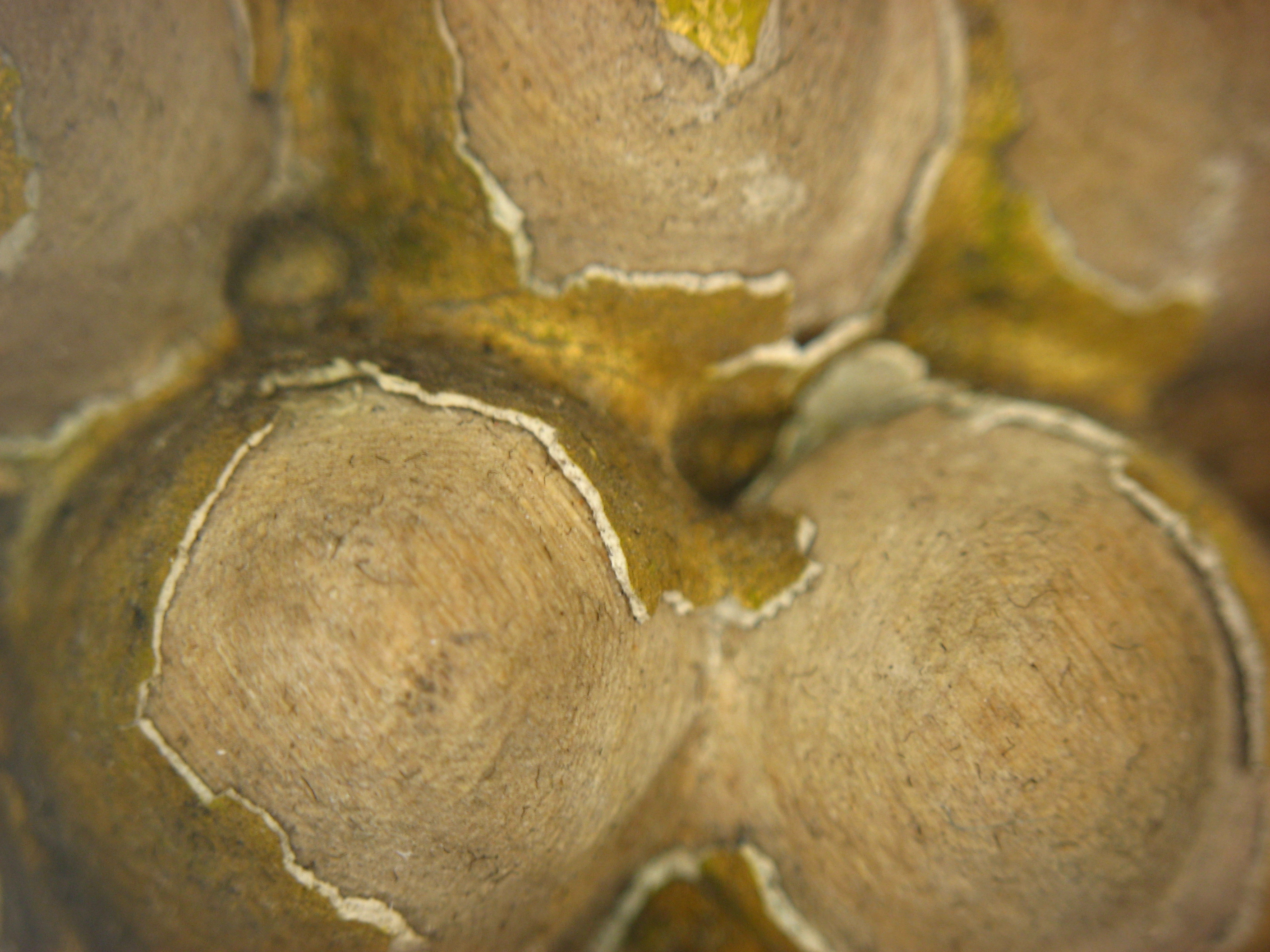 Makrofoto: Detail der geschnitzten, vergoldeten Trauben aus dem Holzrahmen für ein Gipstondo. Zustand vor Konservierung: Die Fassung sitzt nur noch locker auf dem Holzträger. Große Teile von Kreidegrund und Vergoldung sind ausgebrochen, so dass das Holz sichtbar ist.